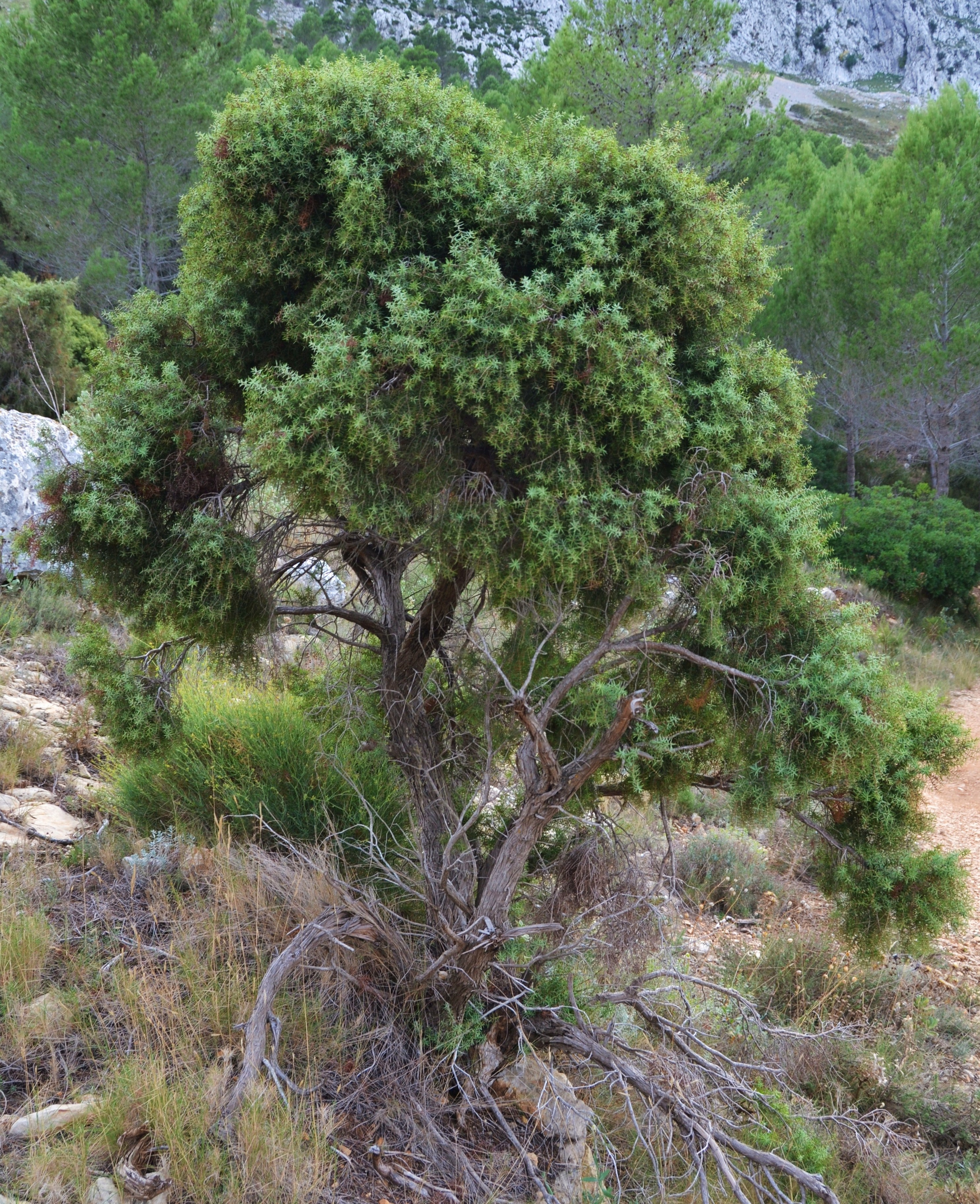 Càdec a la serra de Bèrnia.